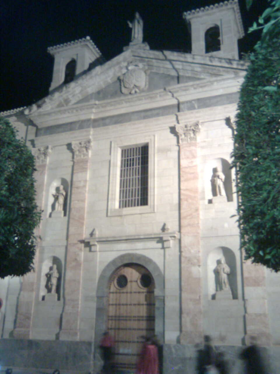 Monasterio de Las Salesas, Orihuela